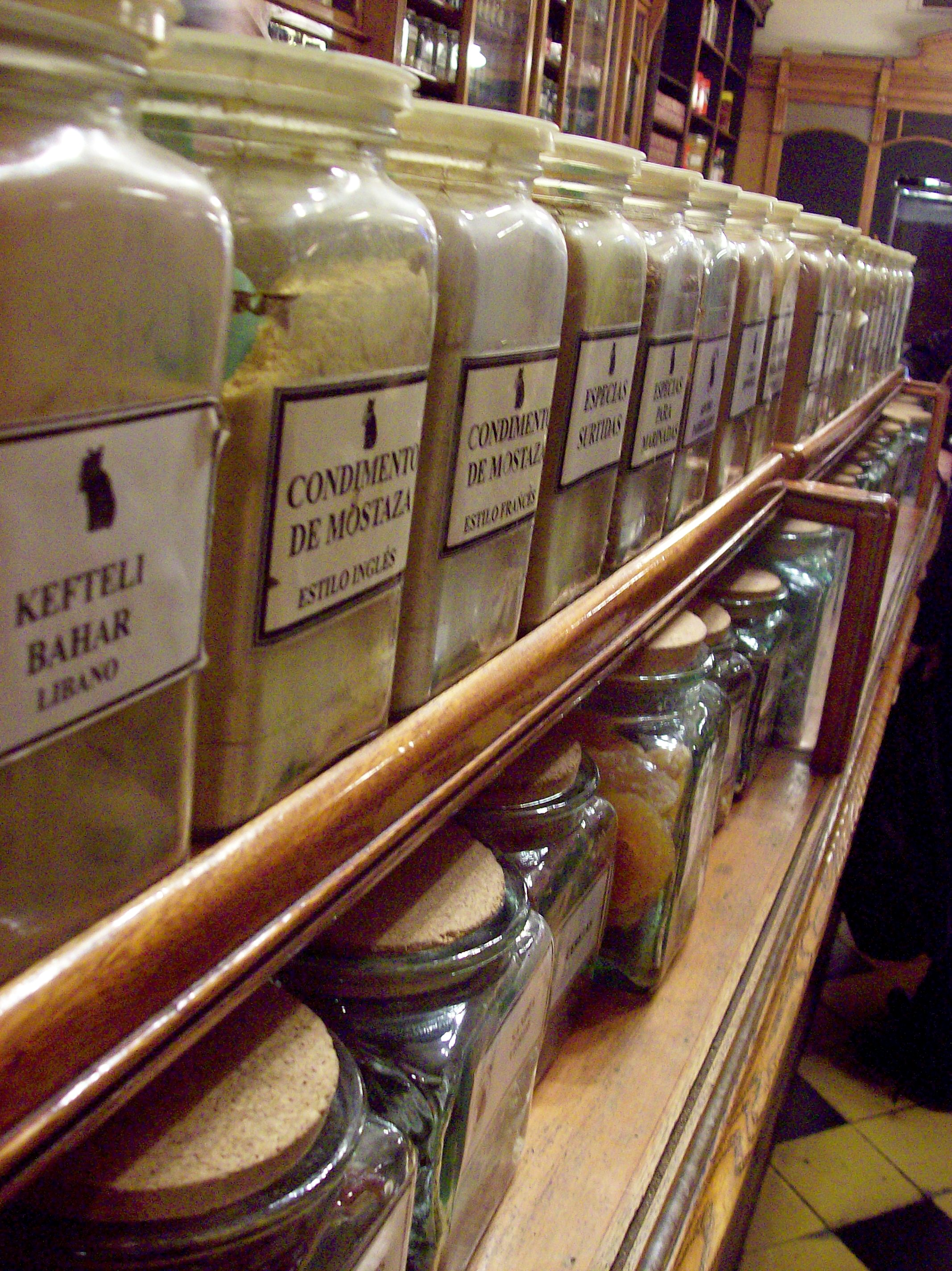 El gato negro (Corrientes 1669, barrio San Nicolás, Buenos Aires, Argentina) es un bar donde se puede disfrutar de gran variedad de estilos de infusiones. Es una de las especierías más antiguas de la ciudad de Buenos Aires (creada en 1927). Tiene un amplio salón en el primer piso. También hay shows de tango, jazz y música melódica.